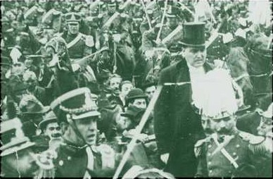 FOTO HISTORICA DE LA ASUNCION DE YRIGOYEN EL 12 DE OCTUBRE DE 1916, SE OBSERVA A SU LADO AL EX MINISRO DE GUERRA DE JULUIO A. ROCA GRAL. PABLO RICCHERI